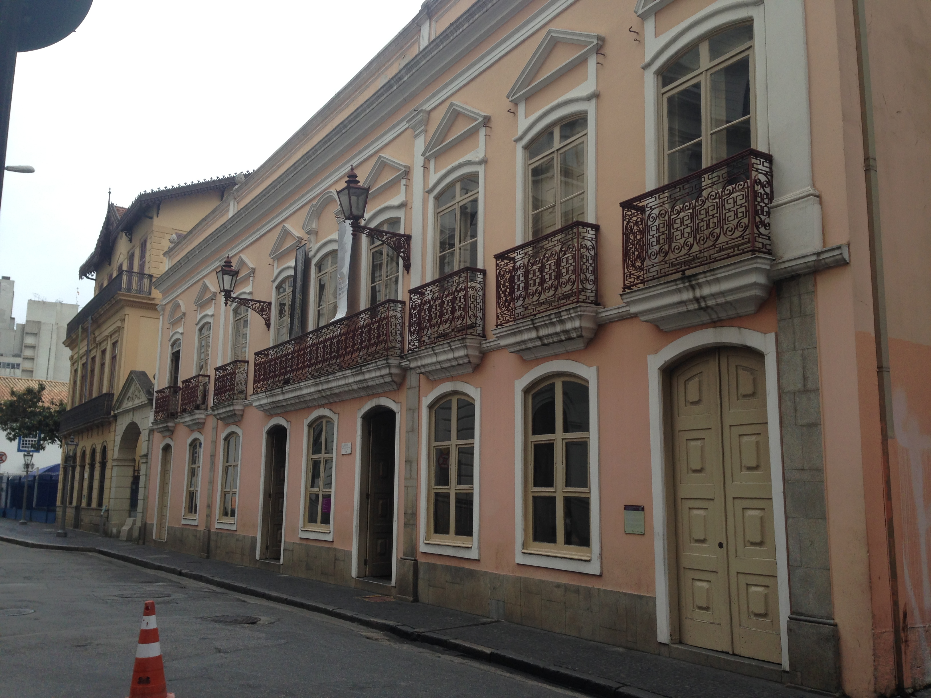 Fachada inteira do Solar da Marquesa de Santos